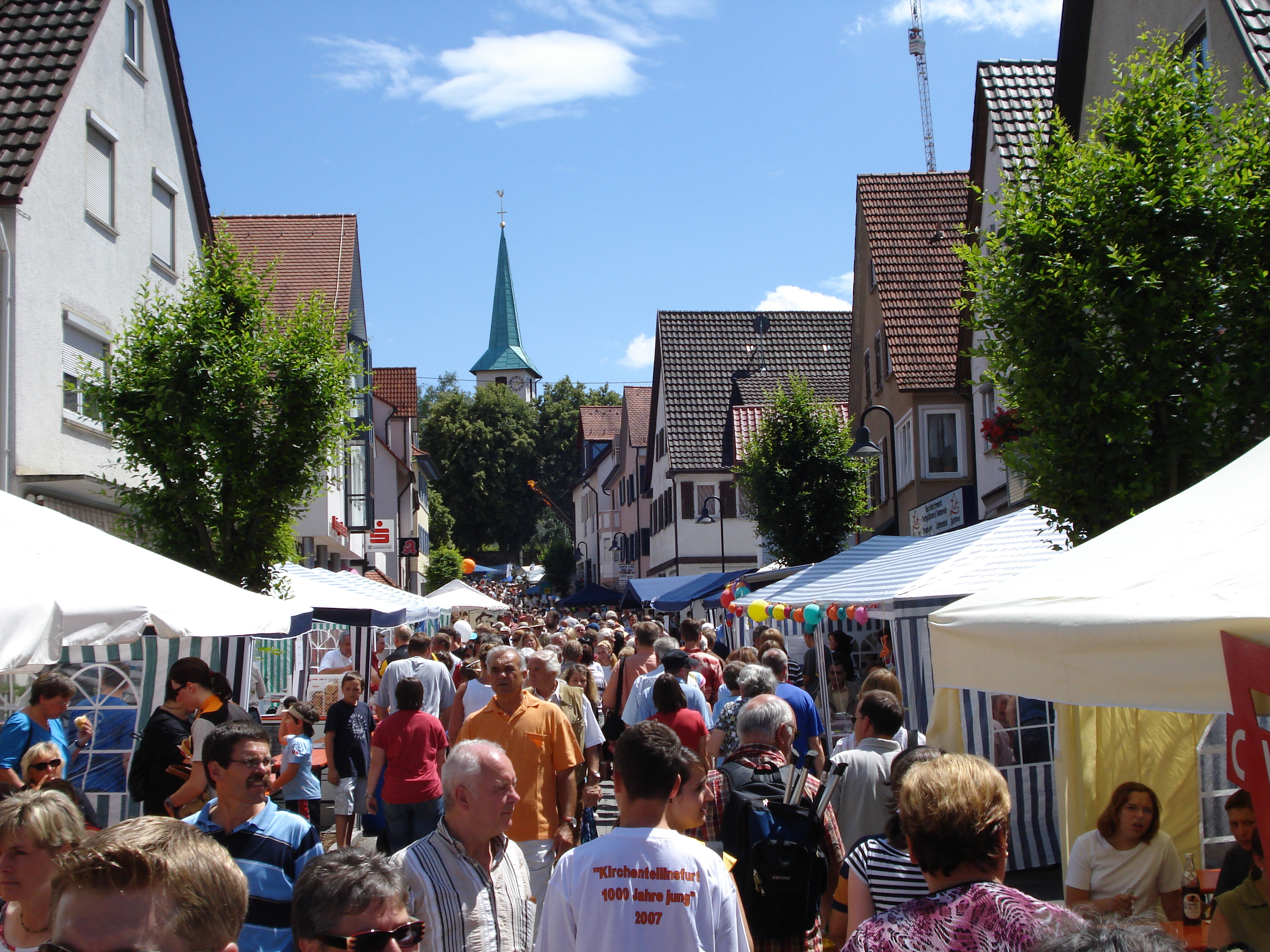 Kirchentellinsfurt Dorfstraße zur 1000-Jahrsfeier 17. Juni 2007